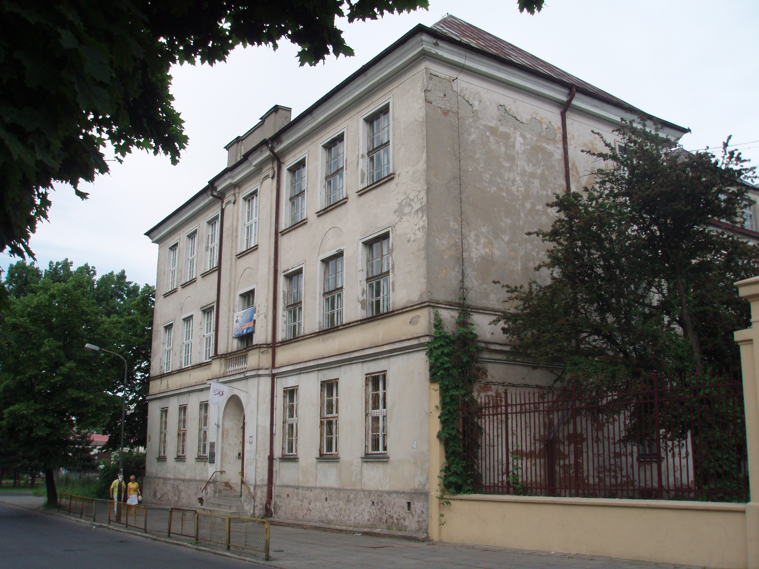 ul. Podmiejska 21 w Łodzi, budynek Liceum Ogólnokształcącego im. Joachima Lelewela